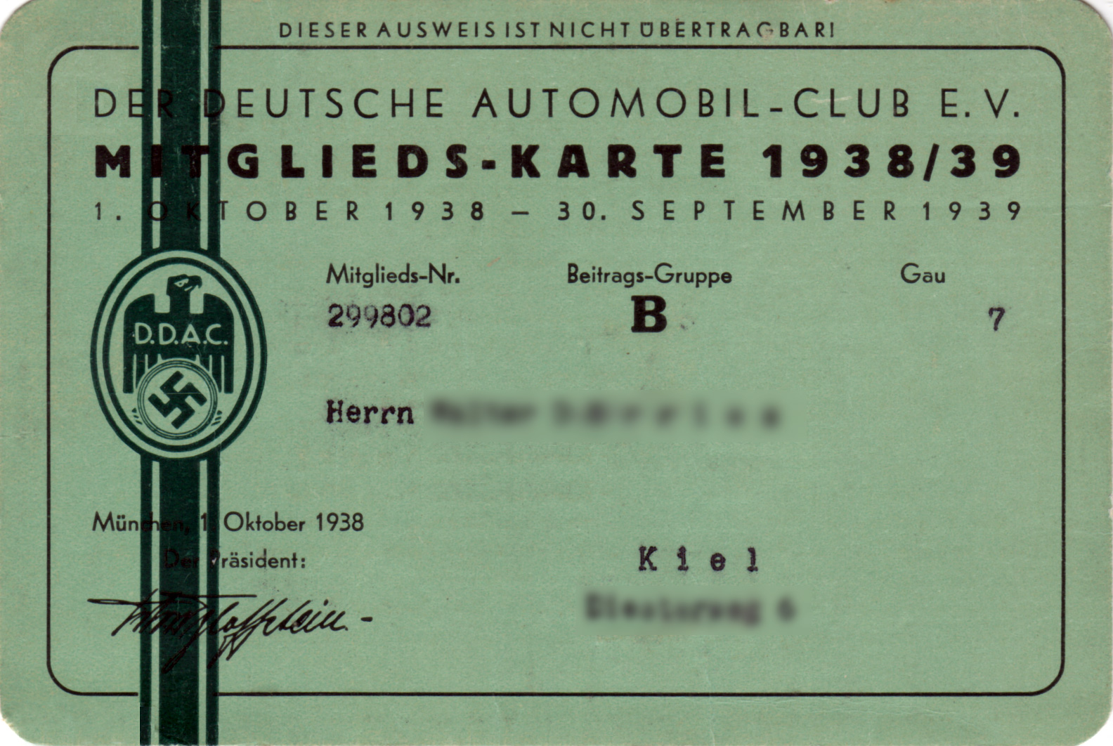 Mitgliedskarte des DDAC (Der Deutsche Automobil-Club), Automobilclub zu Zeiten des Nationalsozialismus. Etwa 1934 bis 1945